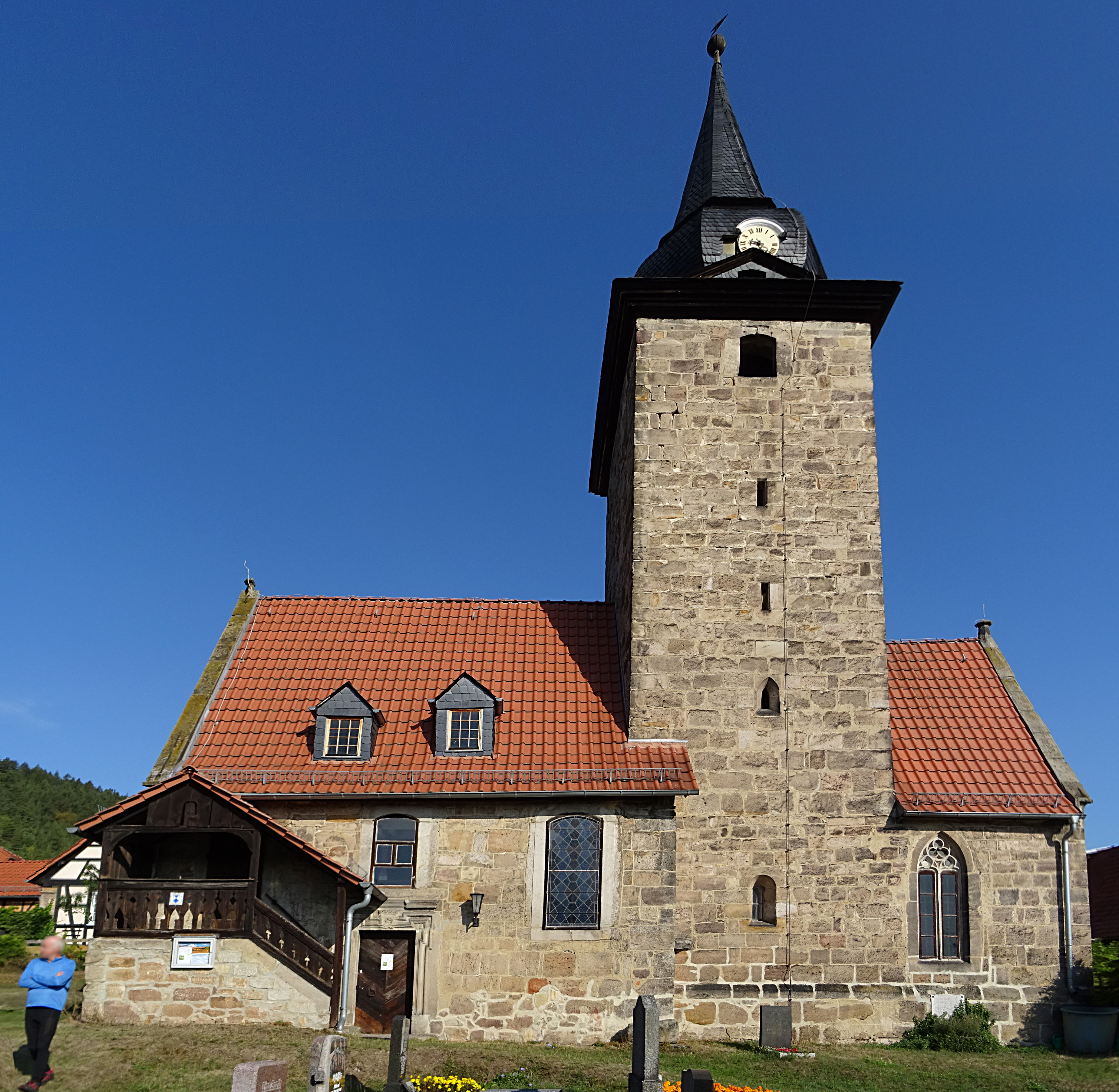 Wehrkirche Zeigerheim (Rudolstadt) von Süden